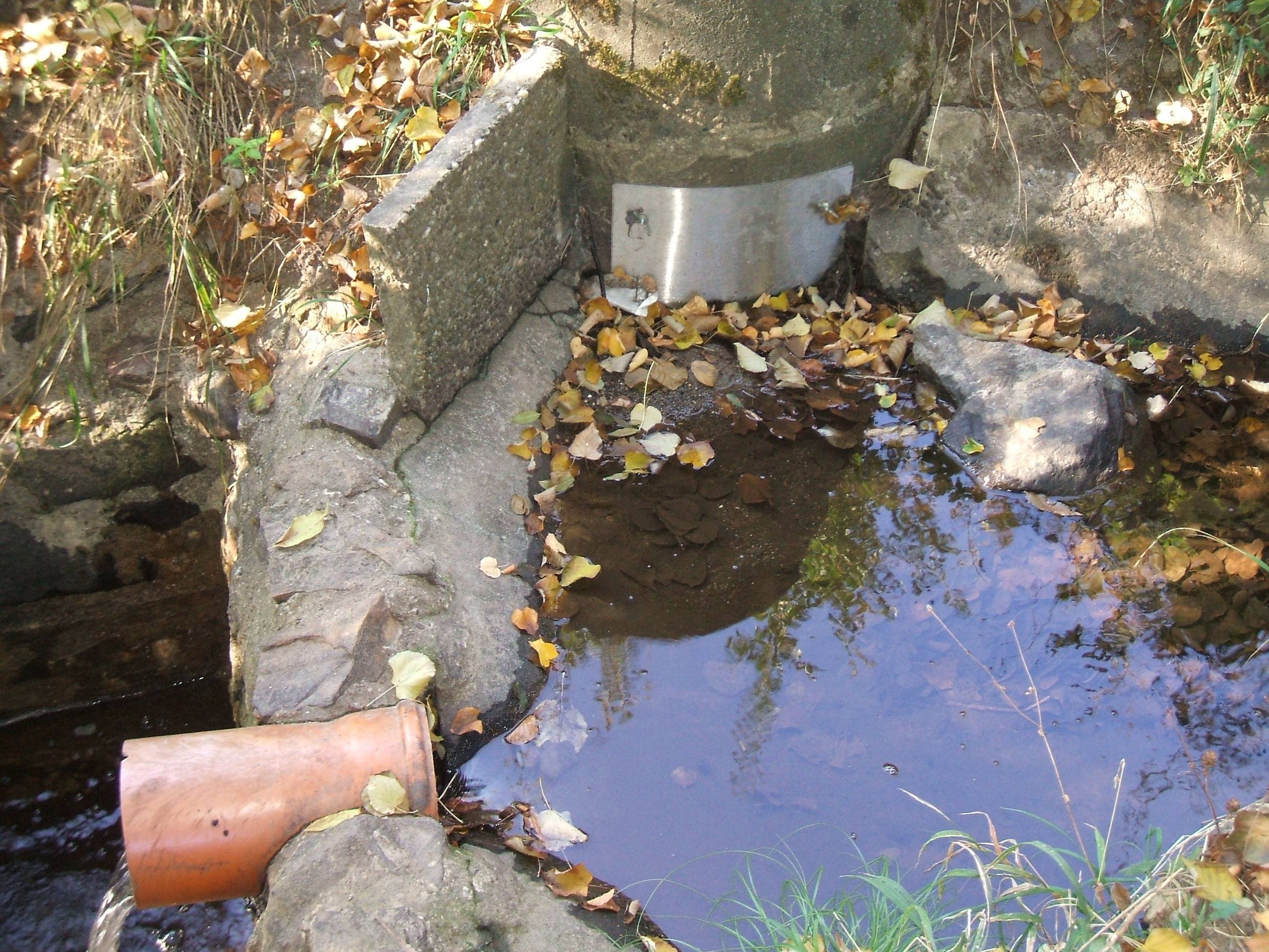 Nach Unterquerung der Autobahn kommt der Seebach/Leihgraben in dieses Staubecken mit einer Art zu aktivierender Prüf- oder Ableiteinrichtung